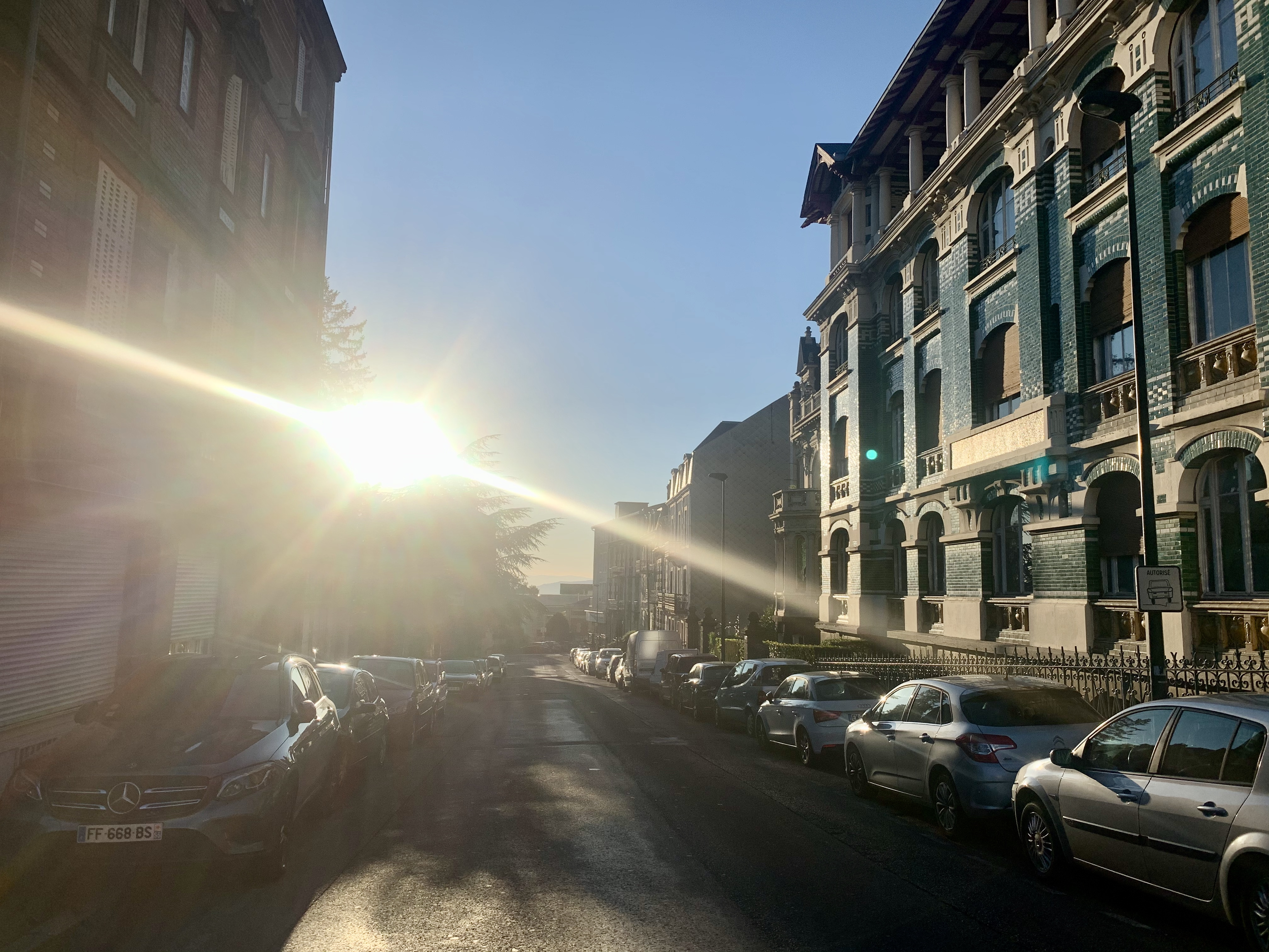 Le Pavillon Majestic se situe à droite au 33 Avenue de la Gare à Chamalières.